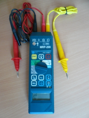 MZC-200 Schleifentester